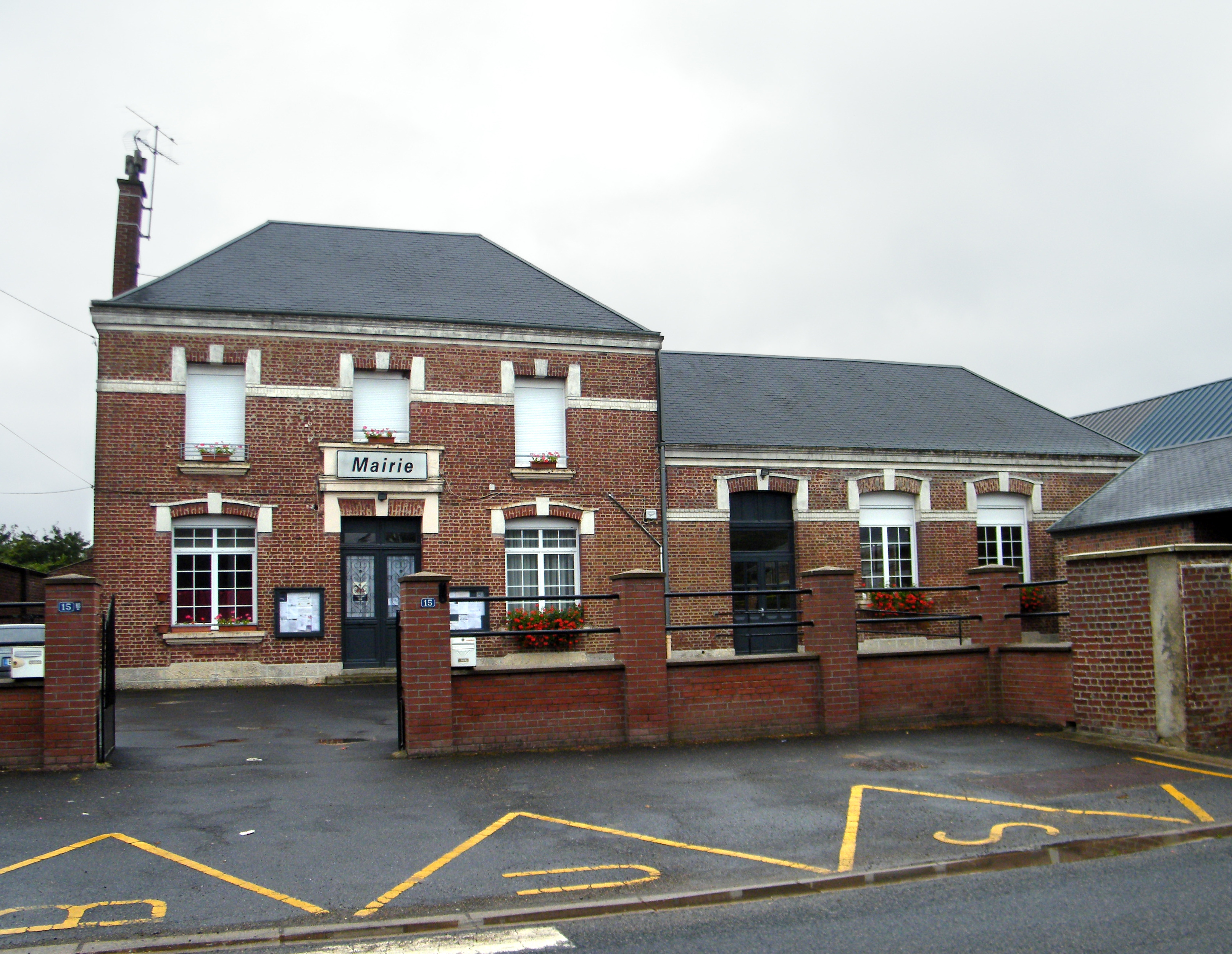 Mairie-école.